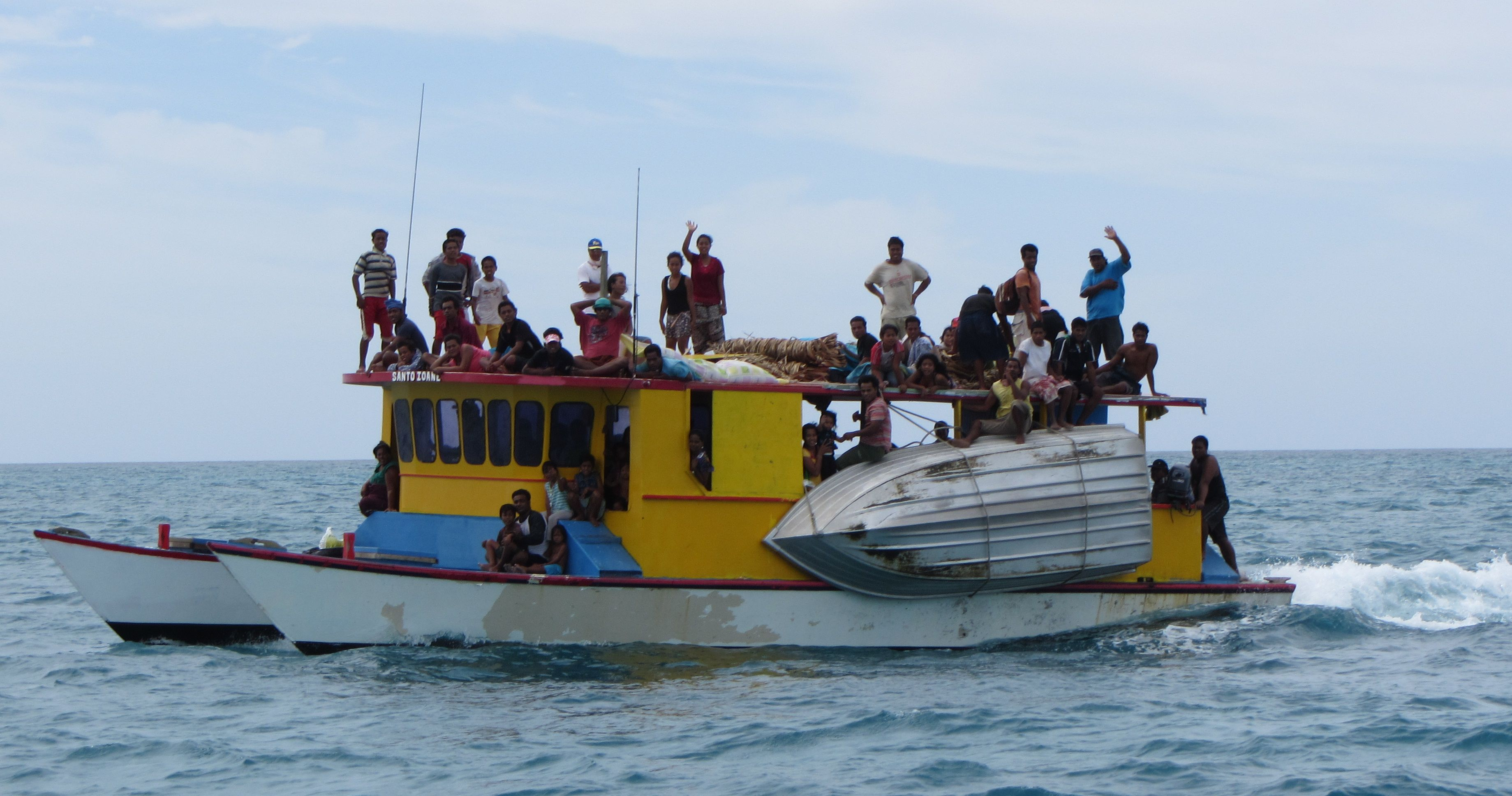 Schiffe die in Kiribati zwischen den Inseln verkehren können teilweise recht voll werden. Hier ein Schiff, das von Abaiang nach Tarawa unterwegs ist.